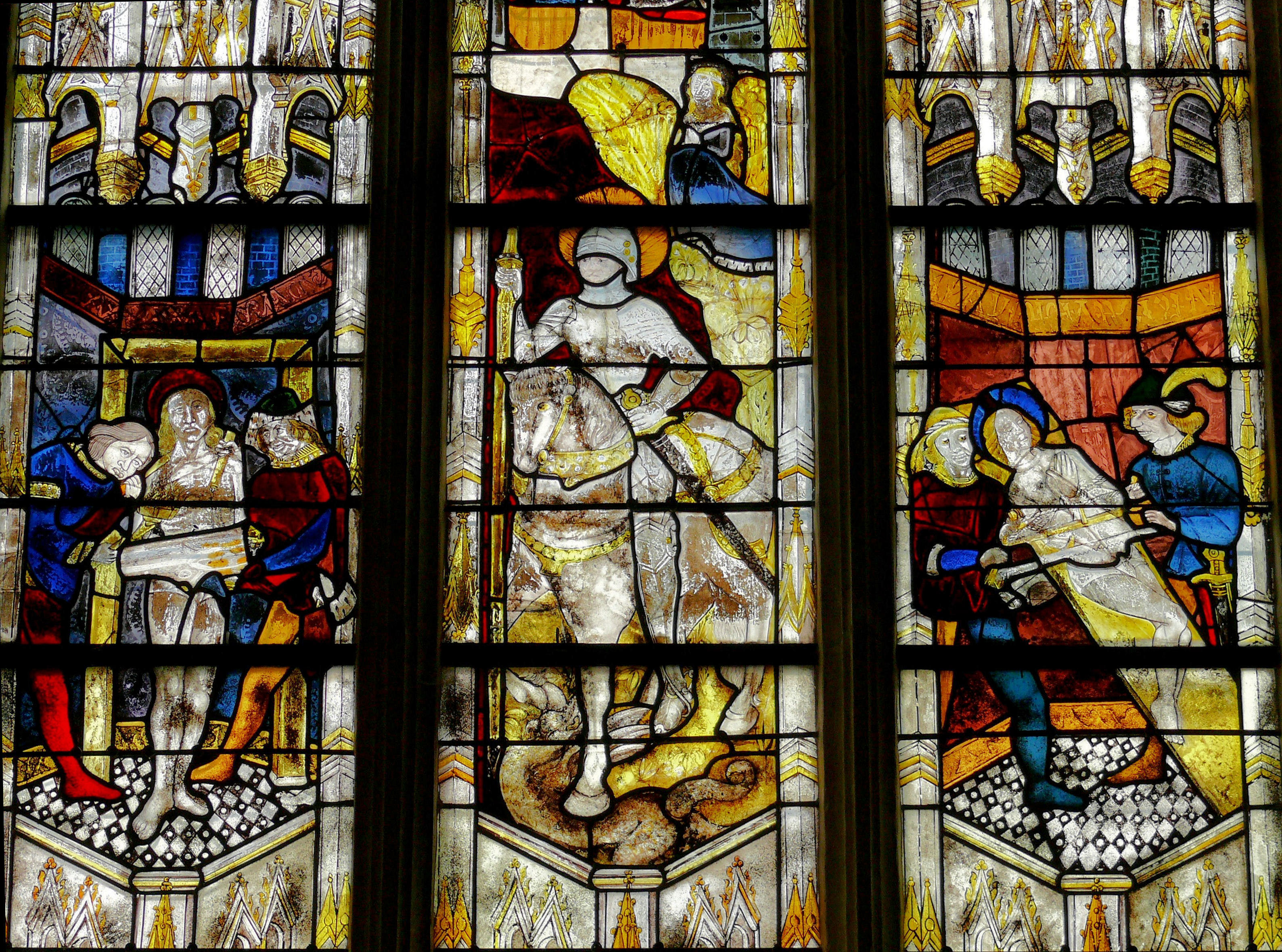 La Ferté-Bernard - Eglise Notre-Dame-des-Marais - Baie n°26 - Verrière de la vie de saint Georges : à gauche, les flancs du saint sont brûlés par deux bourreaux, à droite, il est scié en deux, au centre, saint Georges triomphe du dragon